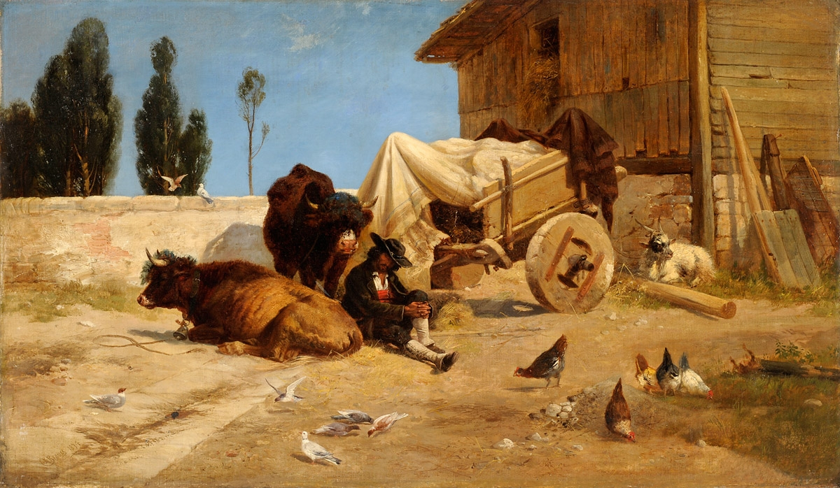 Siesta. Signiert. Datiert 1874. Öl/Lwd., 75 x 125 cm.